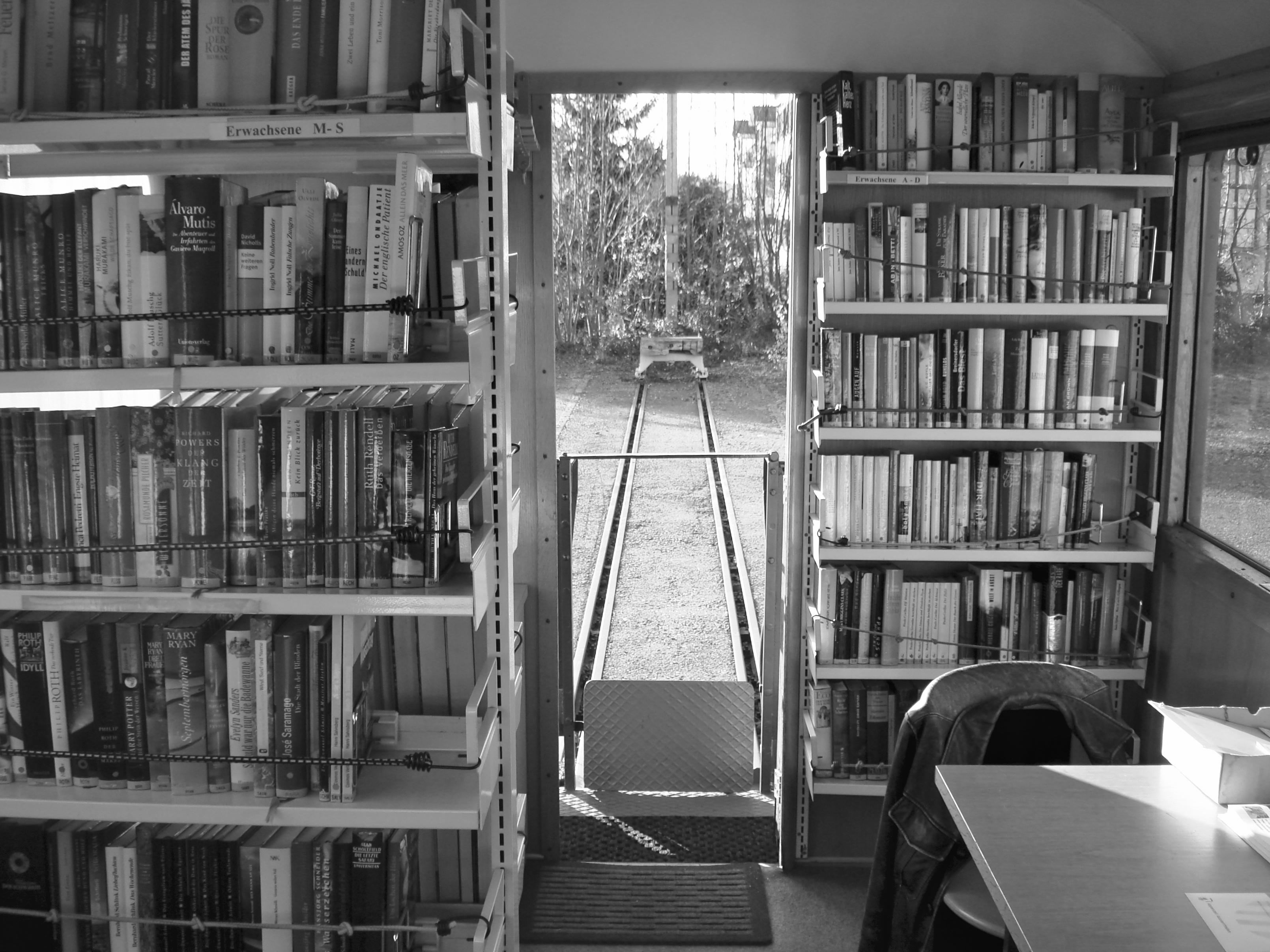 Bibliobahn innen